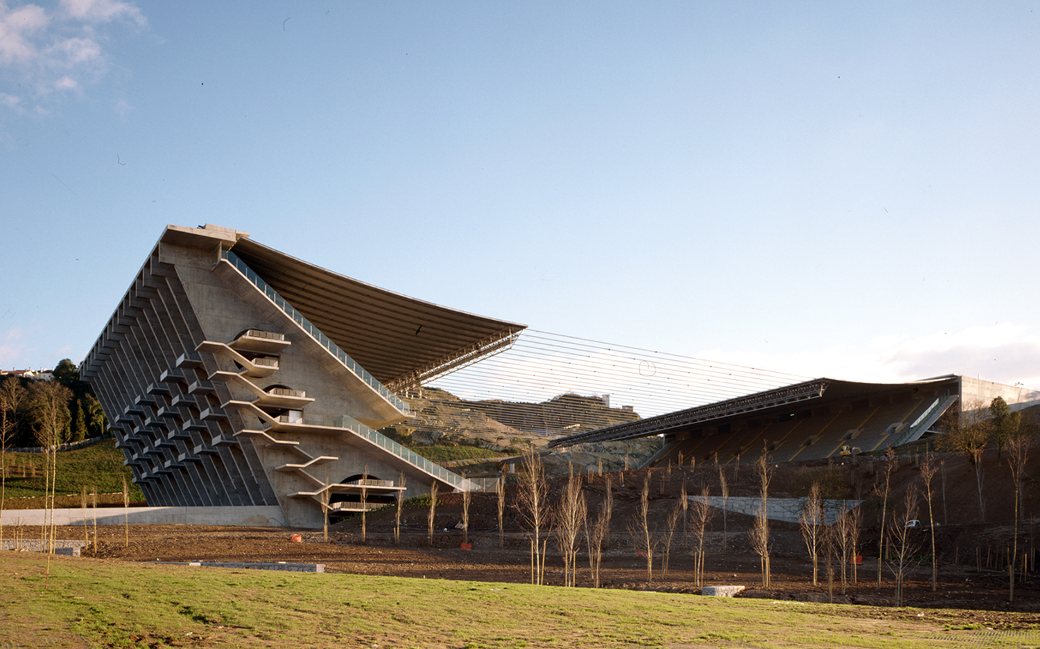 Eduardo Souto de Moura - Braga Stadium 04.jpg